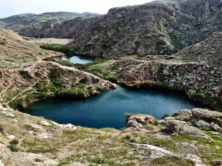 دریاچه دو قلوی سیاه گاو آبدانان